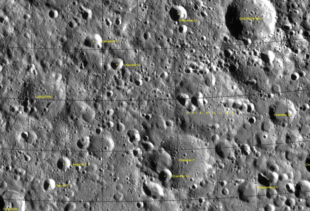 Cráter Chandler (LRO)